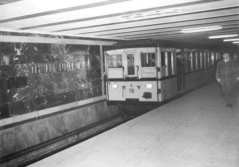 Zentralbild-1950 Sta. U-Bahnhof Thälmannplatz wird eingeweiht. Leihweise Zentral Bild